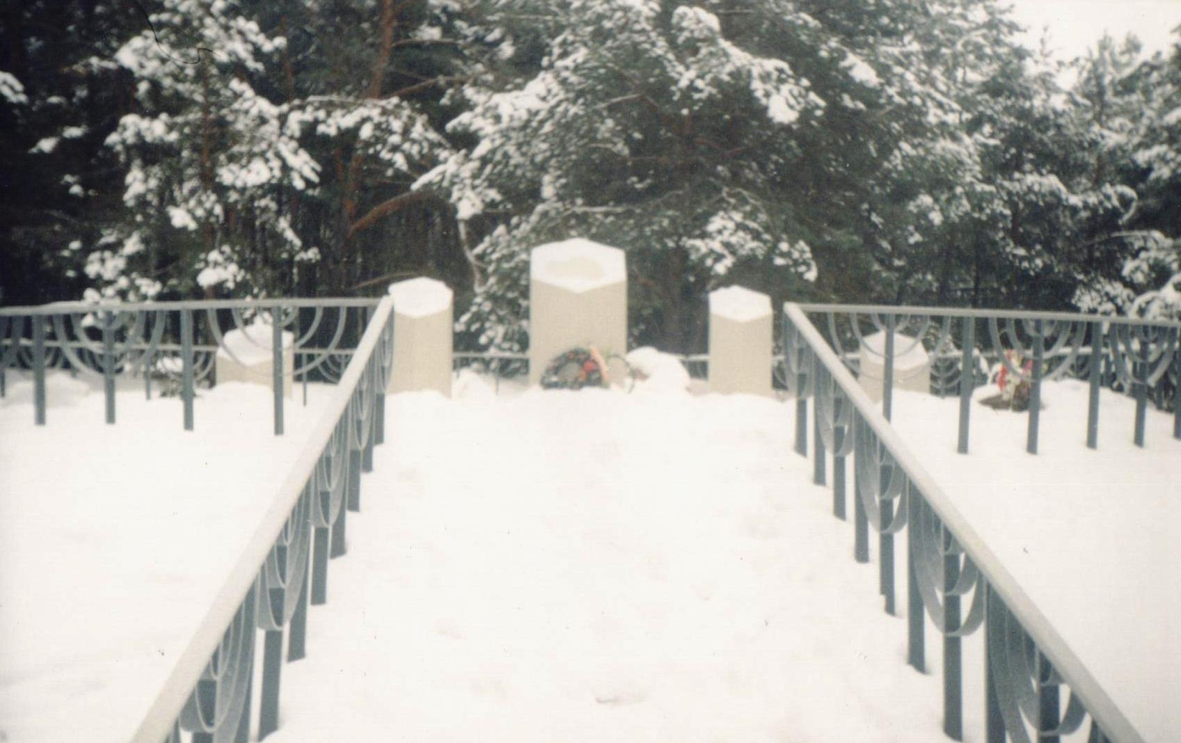 Мемориал памяти жертв геноцида евреев в урочище Хиновск около Давид-Городка Столинского района Брестской области. Открыт в 2010 году.